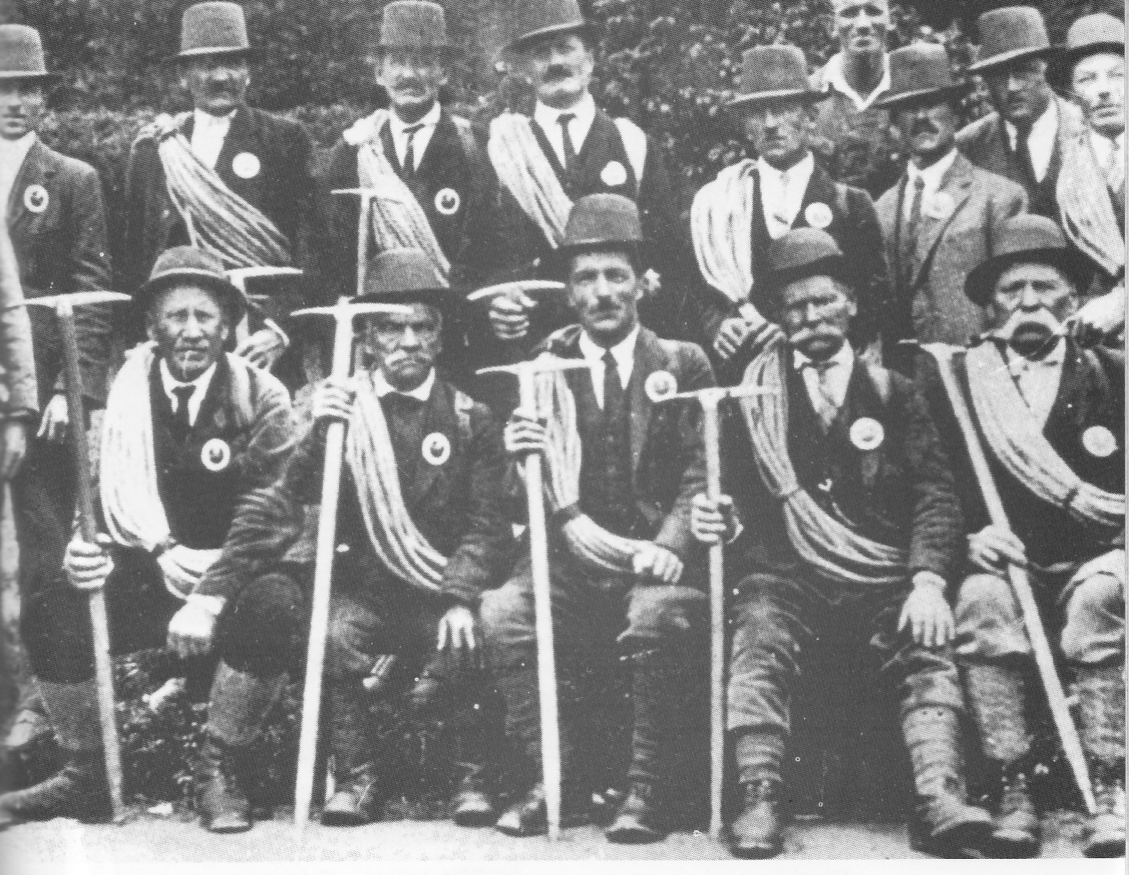 Vysokotatranskí horskí vodcovia v roku 1932